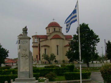 ΙΕΡΟΣ ΝΑΟΣ ΑΓΙΩΝ ΑΝΑΡΓΥΡΩΝ ΝΕΩΝ ΚΕΡΔΥΛΛΙΩΝ